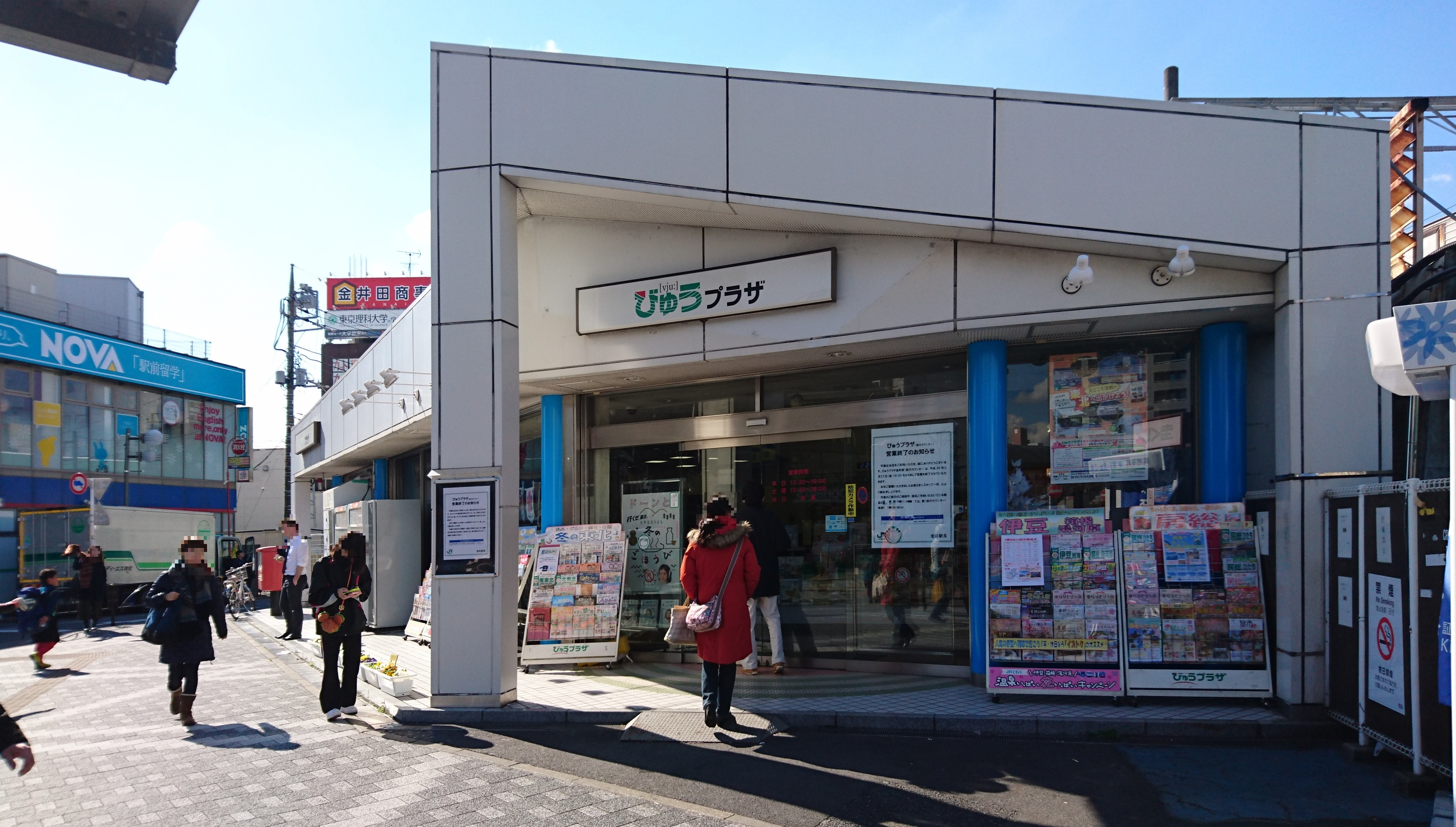 金町駅ビュープラザ2017年2月25日撮影